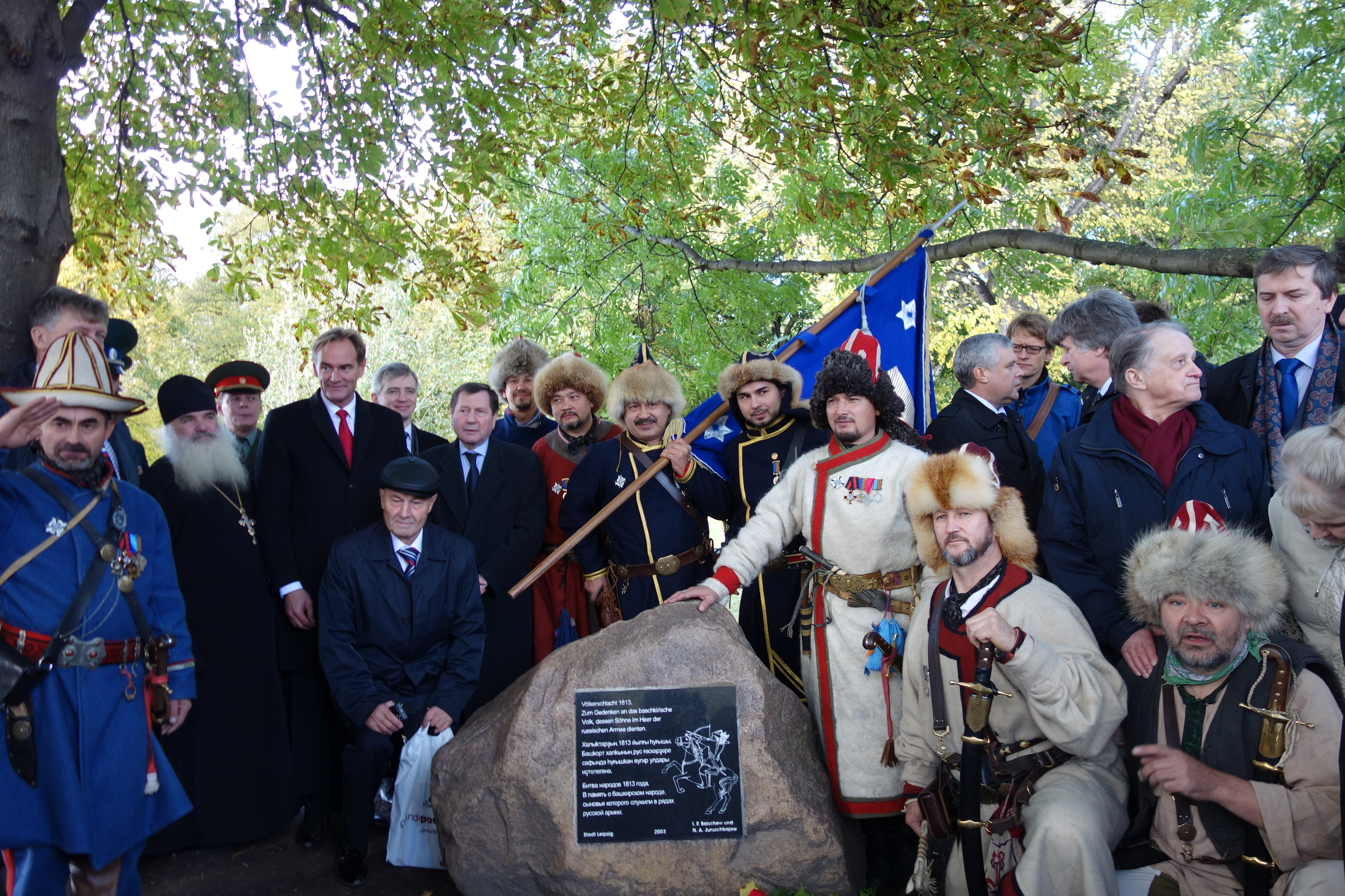 Am Baschkiren-Gedenkstein in Leipzig: Teilnehmer in Uniformen von 1812, Burkhard Jung, der Oberbürgermeister von Leipzig, und die Delegation Russlands. Aus dem Archiv des РОО ВИК 1. Baschkirisches Kavallerie-Regiment Lyubizar der Republik Baschkortostan.